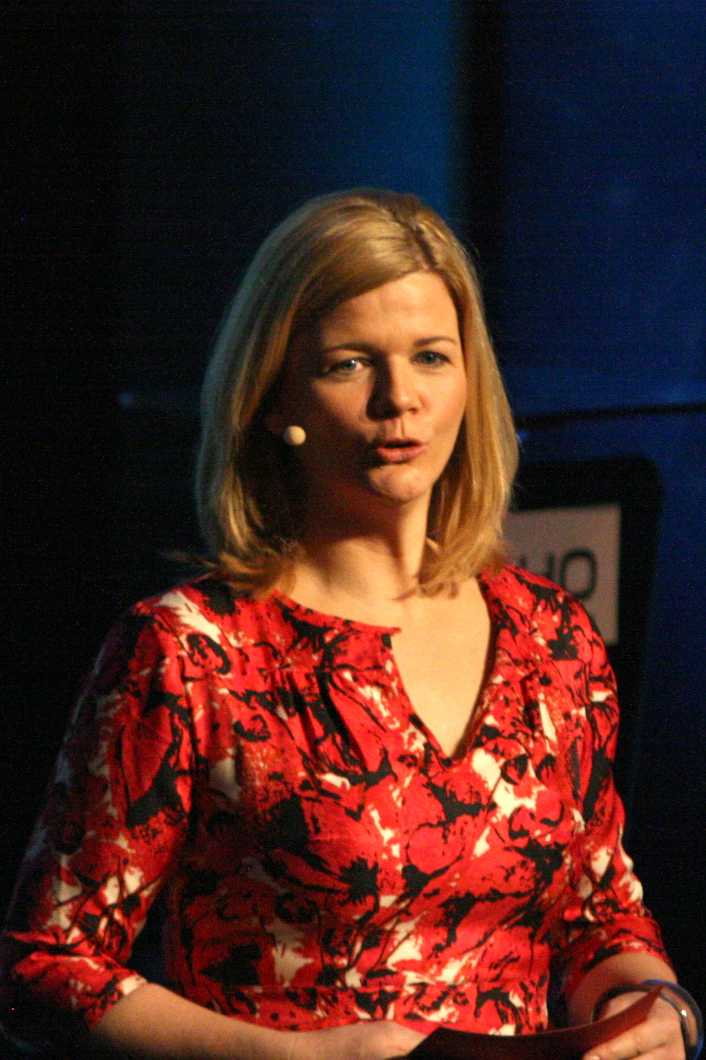 Anne Lindmo, NRK-programleder. Fra NHOs Årskonferanse 2009.